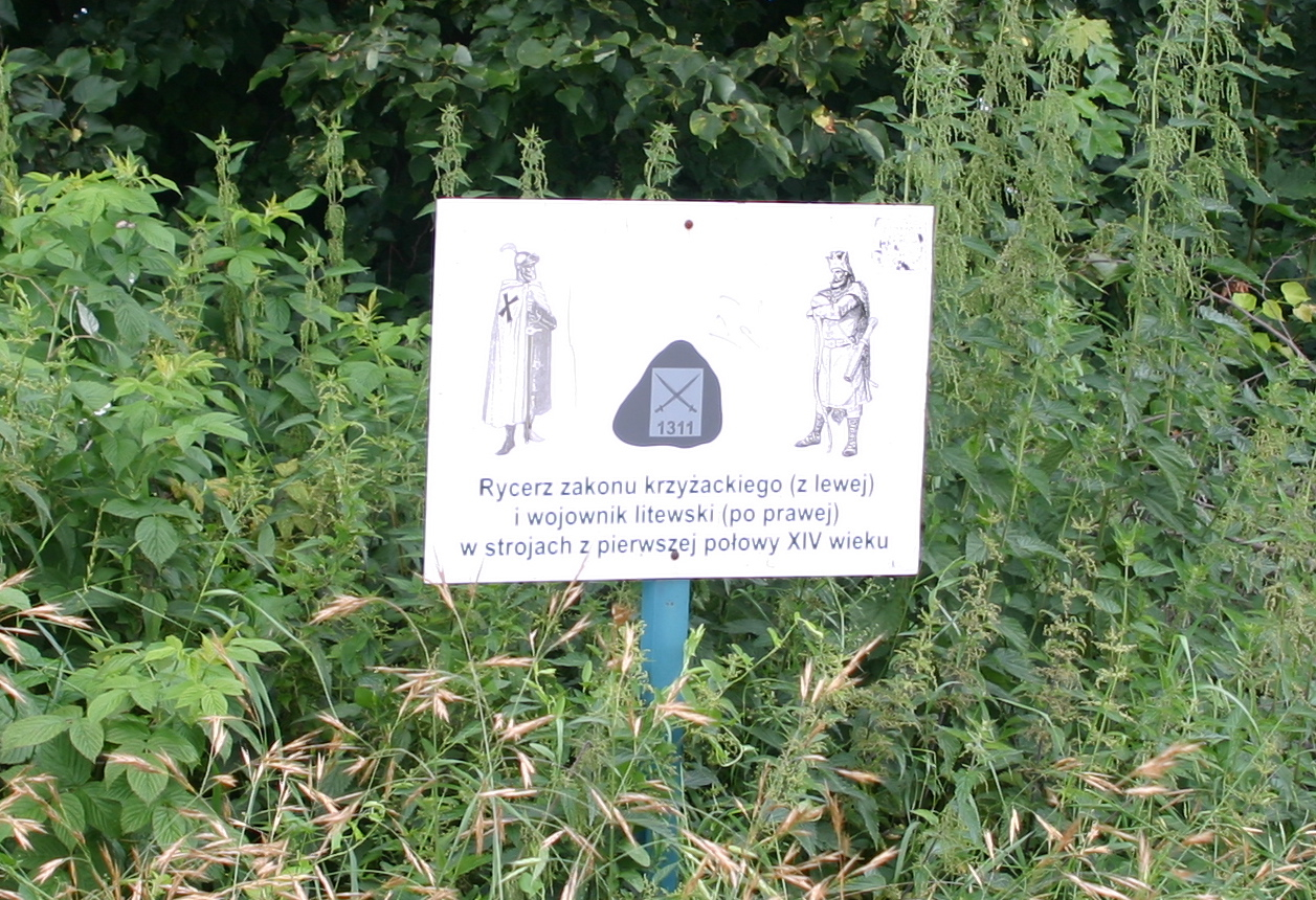 Okolice Wopławki - pomnik bitwy pomiędzy wojskami litewskimi a Zakonem Krzyżackim w 1311 r.